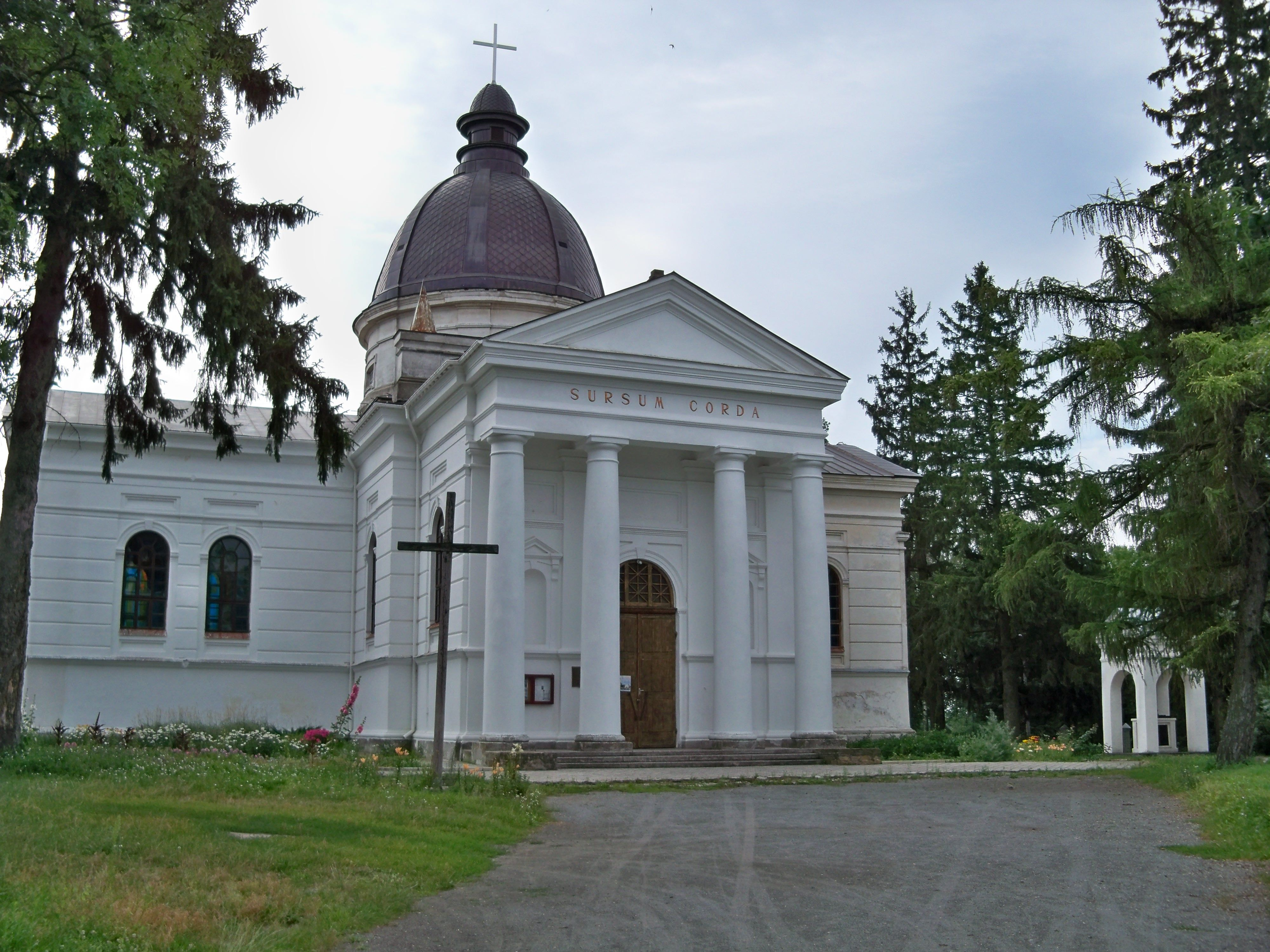 Костел Успіння Діви Марії (мур.), Острог, вул.Князів Острозьких